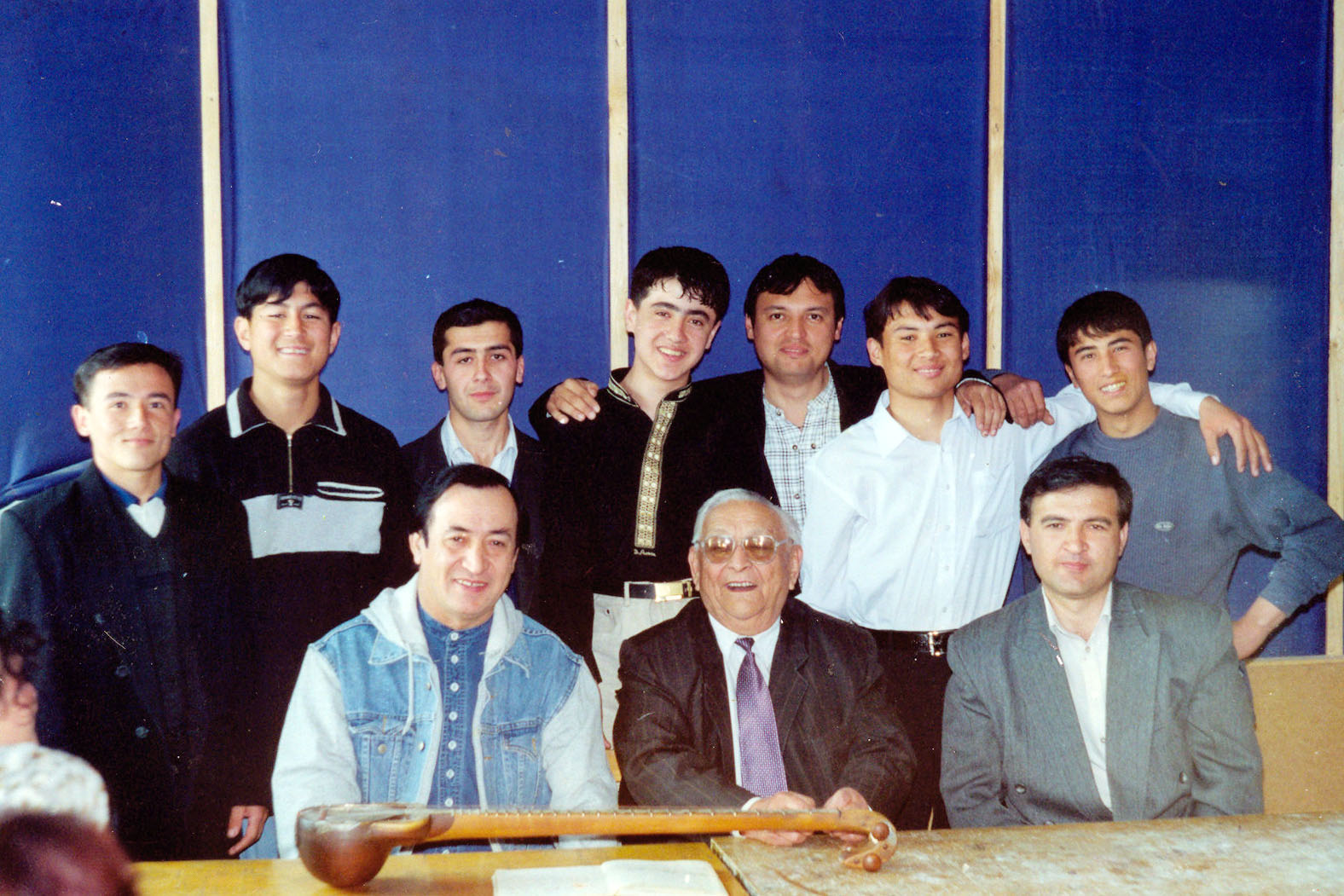 Народный артист СССР Джурабек Муродов и профессор боймахмад Ниязов в кругу студентов факультета искусств ХГУ им. Б. Гафурова г.ХоджентТоҷикӣ: Ҳунарпешаи халқии СССР Ҷӯрабек Муродов ва усдоди Шашмақом. профессор Боймаҳмад Ниёзов бо донишчуёни ДДХ дар ш. Хуҷанд